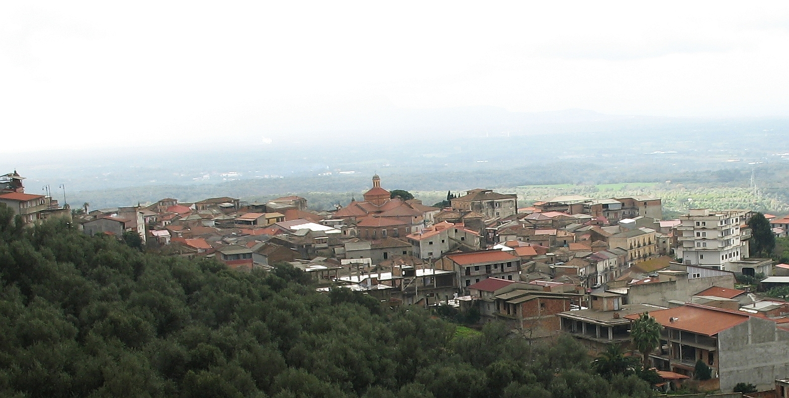 Laureana di Borrello, panorama